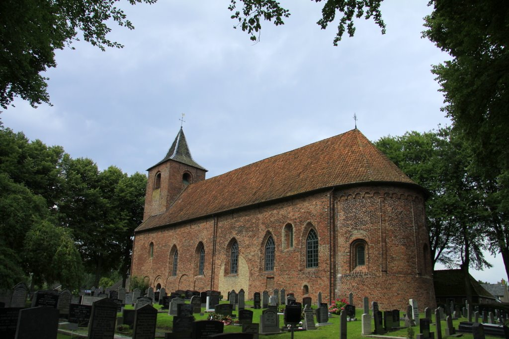 De zeer oude Romaanse kerk uit omstreeks 1200 in Westergeest. Het is een rijksmonument met Monumentennummer 23767. Westergeest is een dorp in de gemeente Kollumerland en Nieuwkruisland. Een uitvoerige beschrijvin van de kerk staat op .nl.